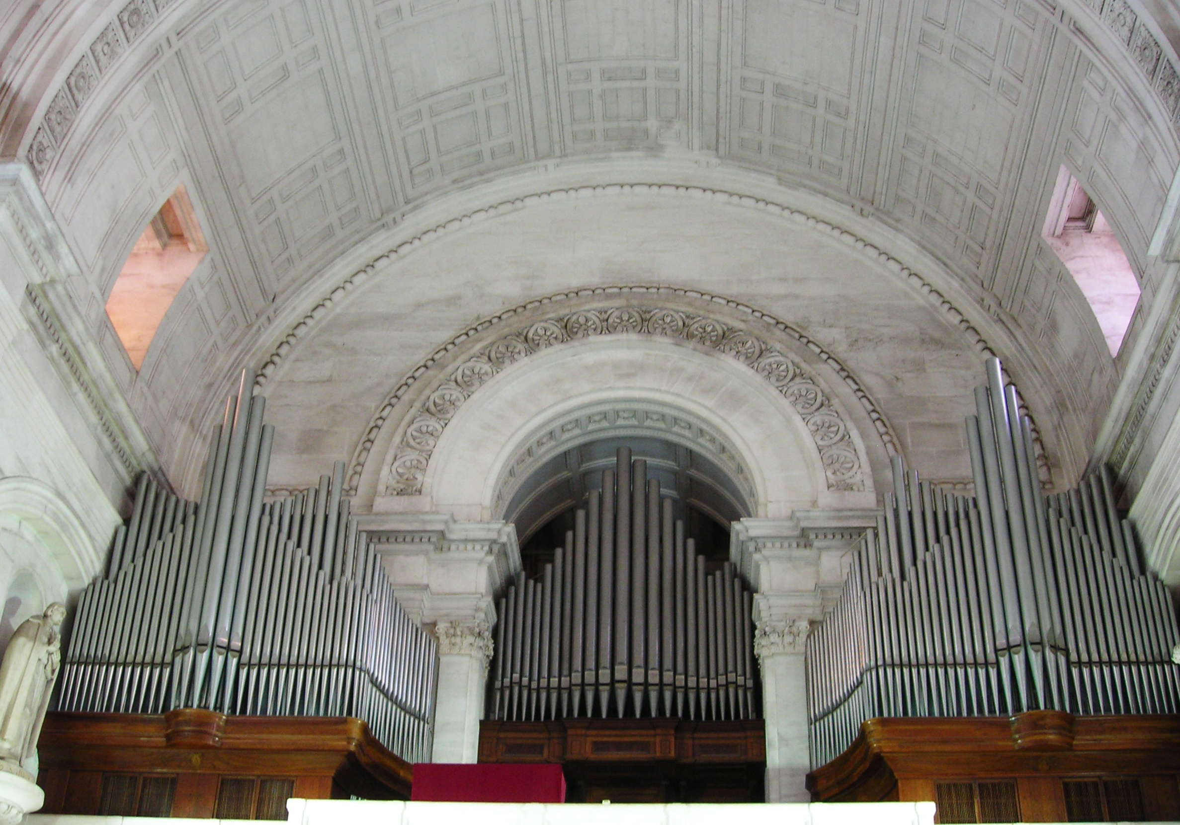 Santuário de Fátima